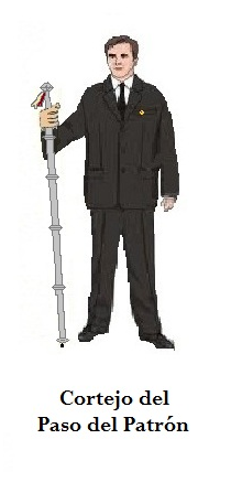 Hábito del Cortejo del Santo Patrón